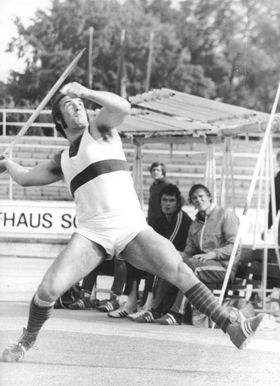 Wolfgang Hanisch ADN-ZB Kluge 02.07.1977 Dresden: DDR-Leichtathletik-Meisterschaften-3.Tag-Den Meistertitel im Speerwerfen sicherte sich der Hallenser Wolfgang Hanisch mit 84,74 Meter.